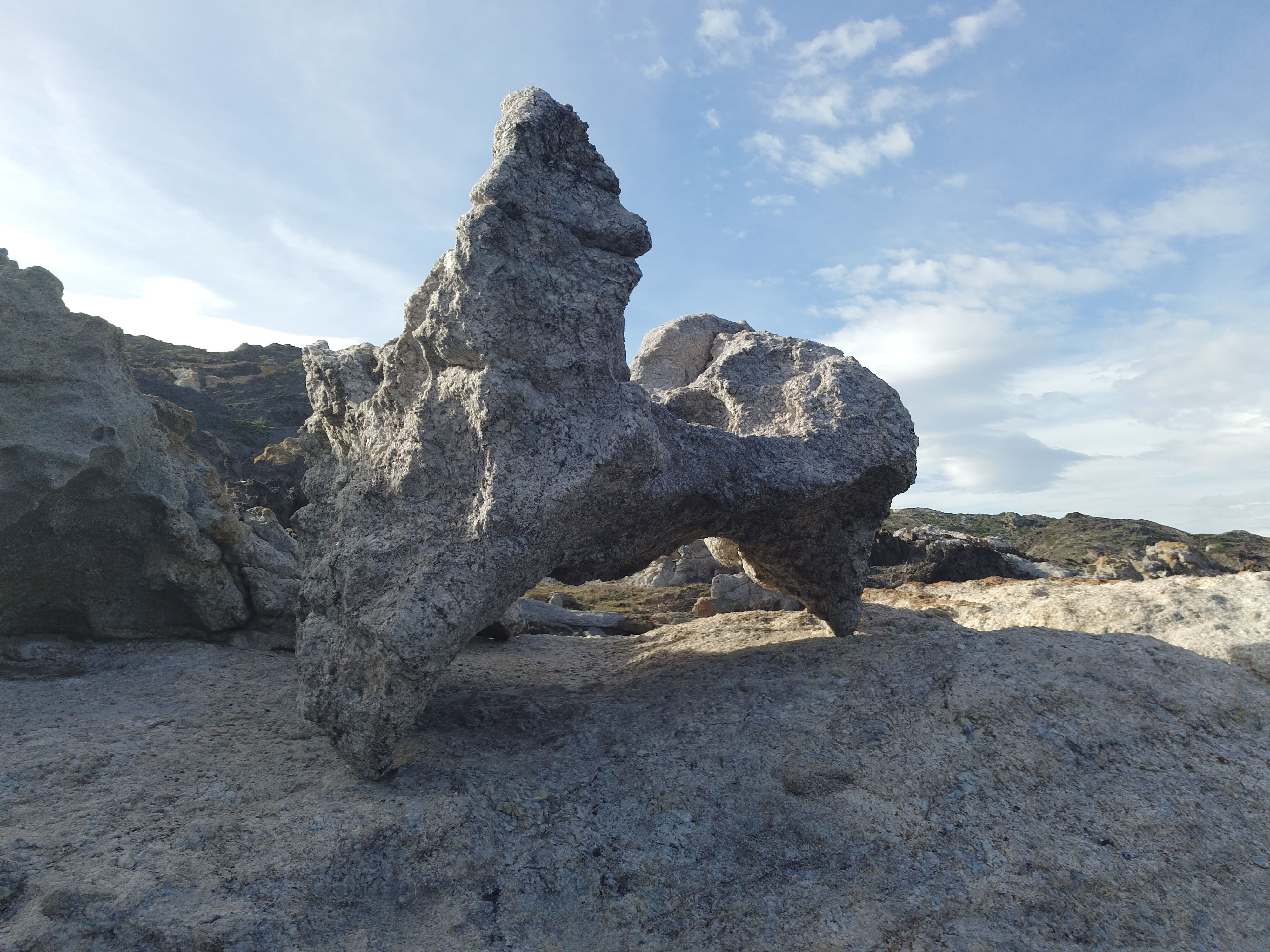 Cap de Creus This is a photography of a Special Area of Conservation in Spain with the ID: ES5120007. Natura2000 entry, EEA entry